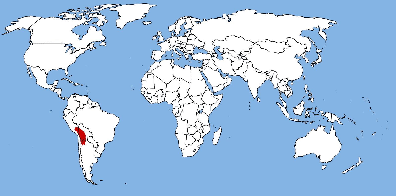 Altiplato (Andes)